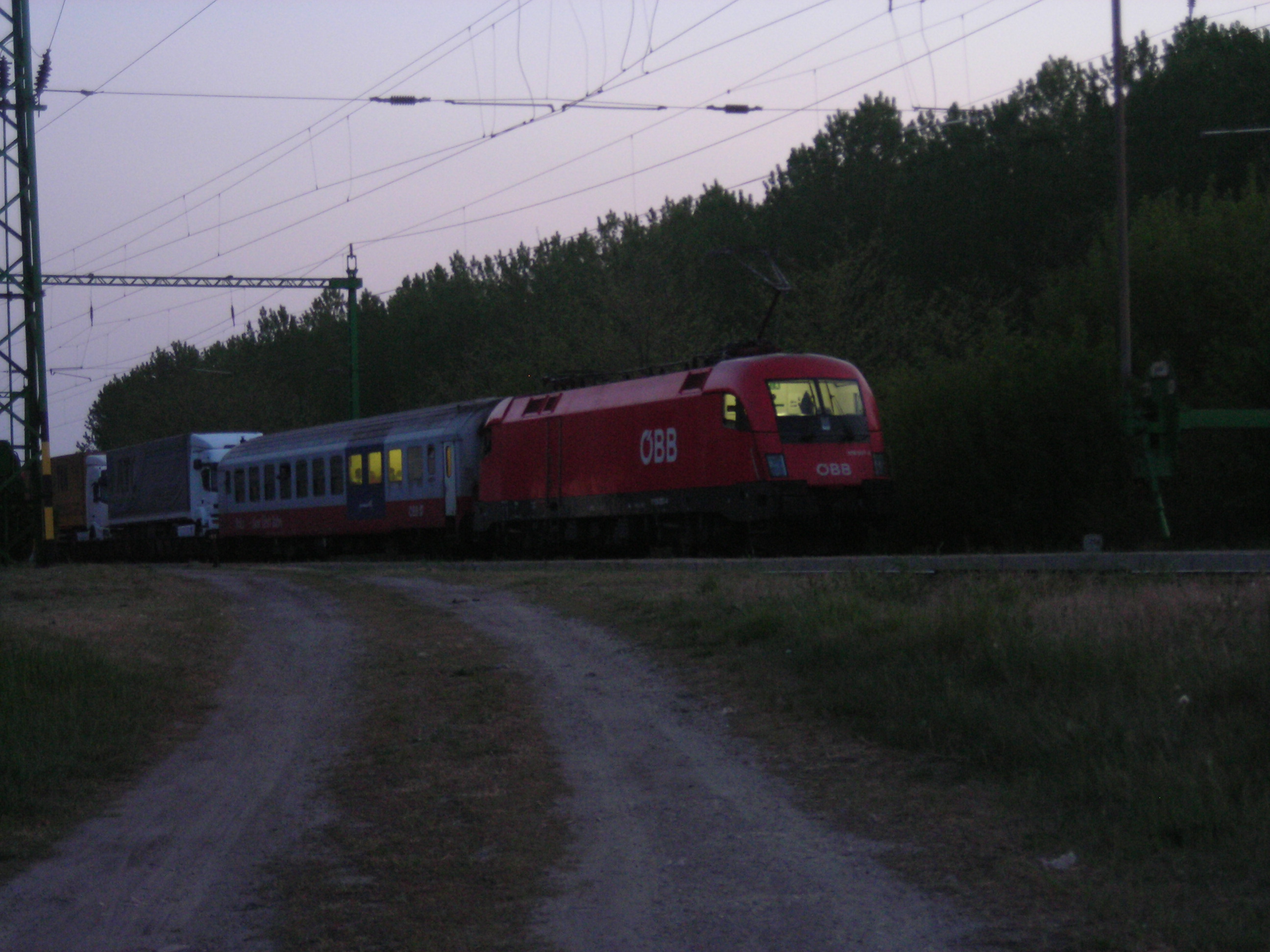 Az ÖBB mozdonya Katonatelep állomáson